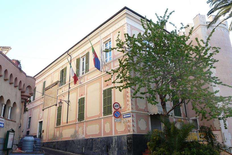 Palazzo Comunale, Diano Castello, Liguria, Italia